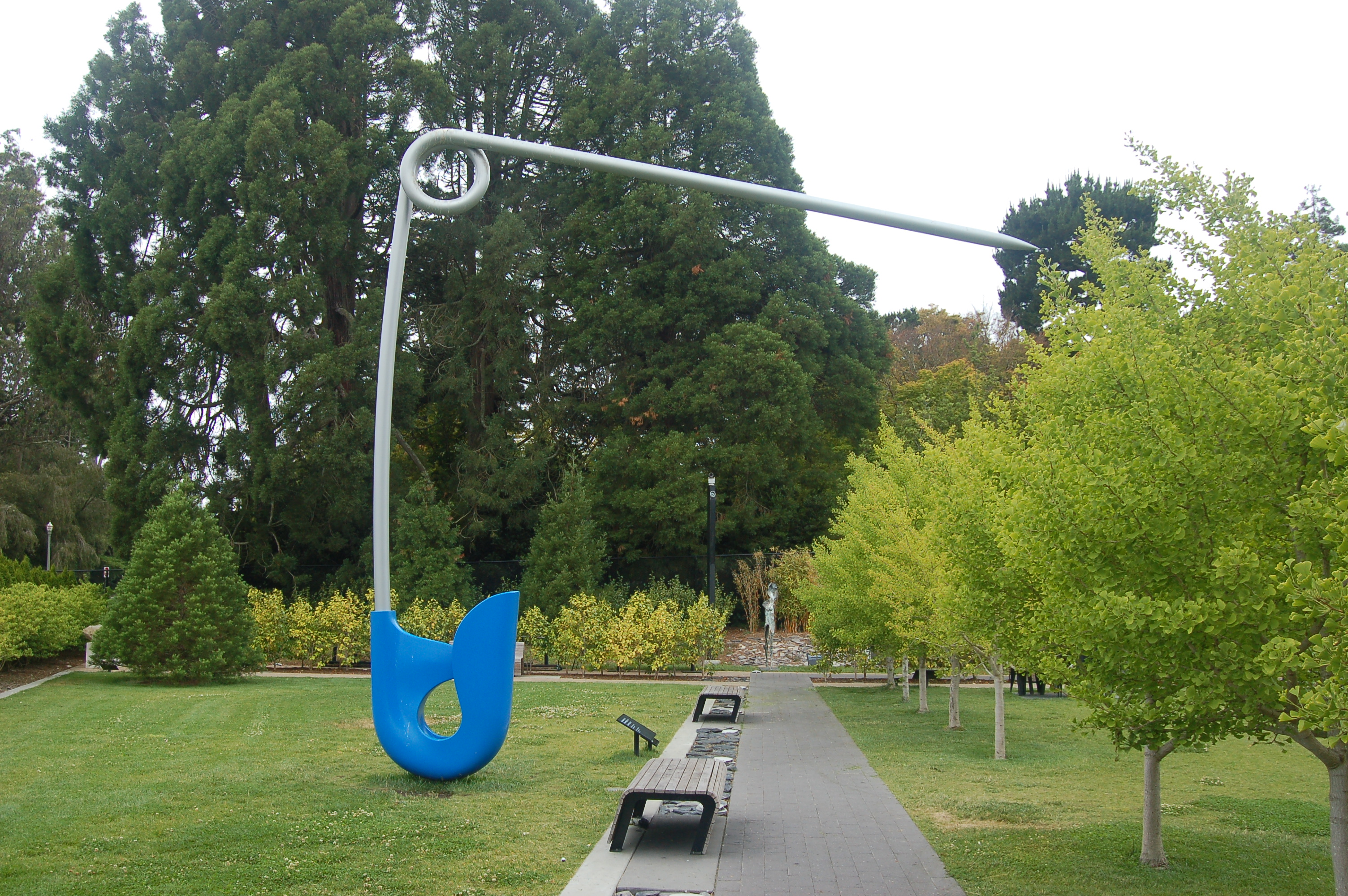 Giant Safety Pin @ De Young Museum